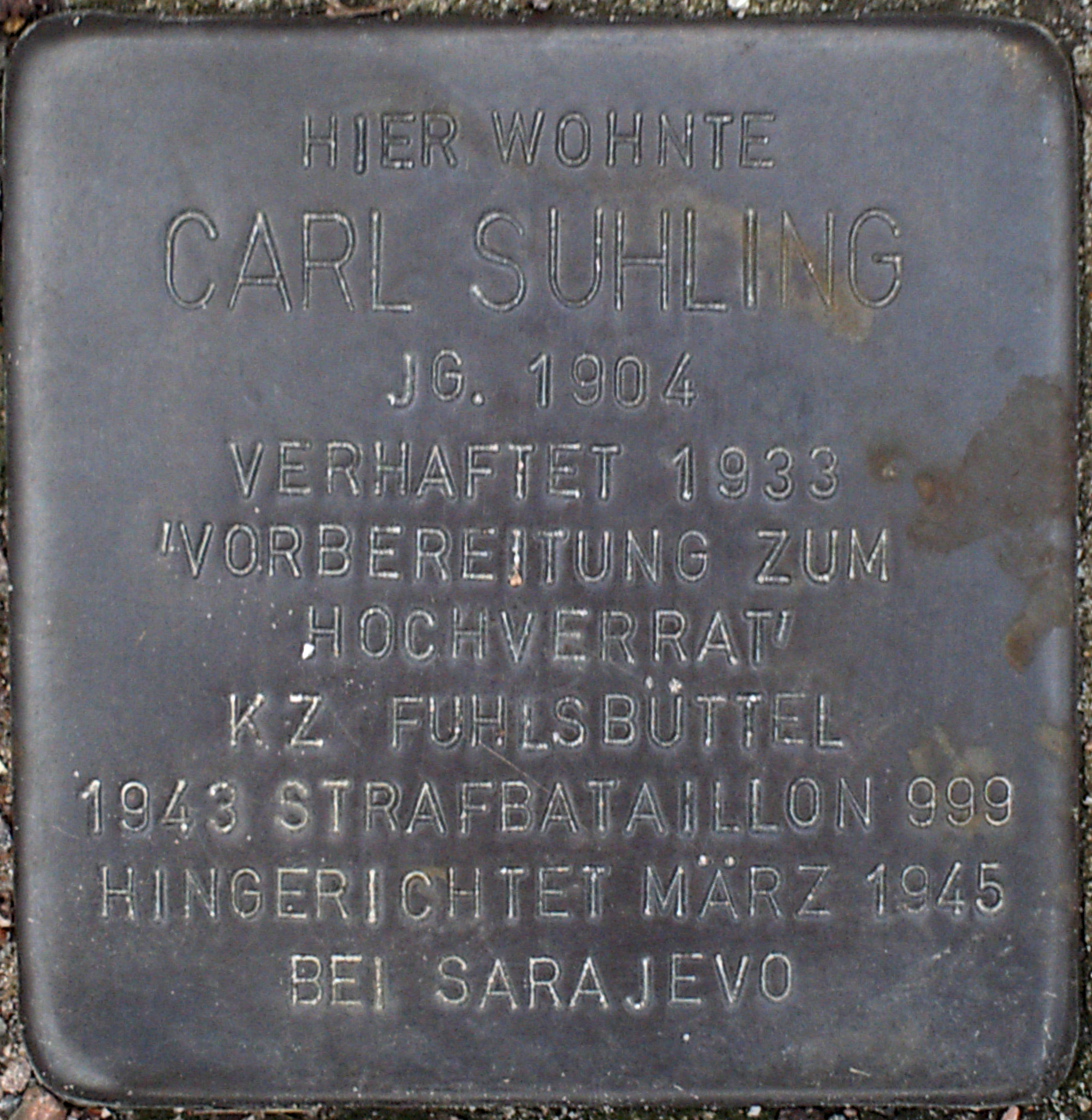 Stolperstein Carl Suhling, Hamburg-Langenhorn, Wattkorn 7. Ein Stolperstein für Carl Suhling, Infoarchiv Norderstedt. Ein unbeugsamer Widerstandskämpfer.